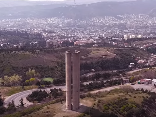 დაუმთავრებელი მემორიალი